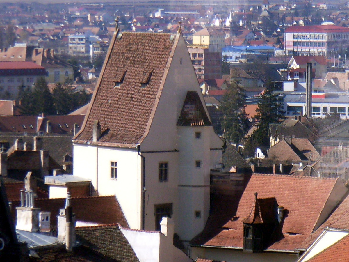 Das Altemberger-Haus in Sibiu-Hermannstadt, ehemaliges Rathaus, jetzt Geschichtsmuseum.